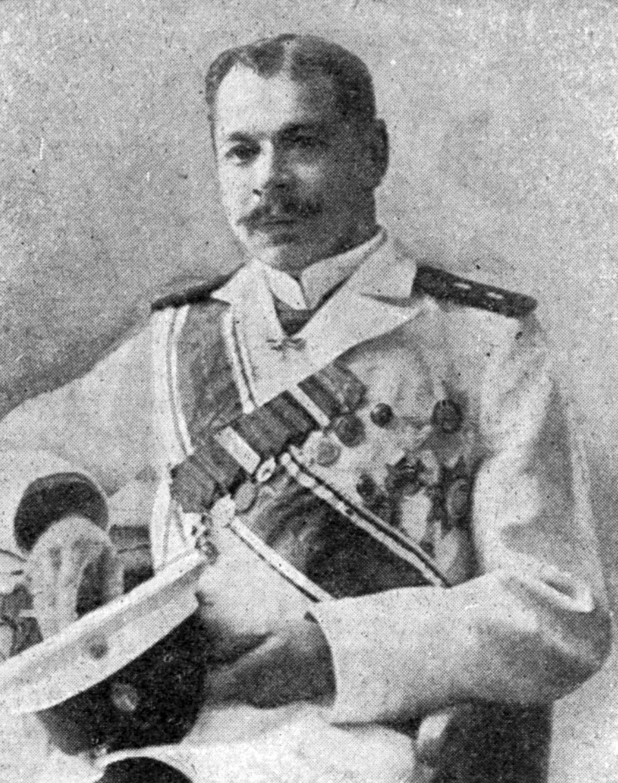 Пильц, Александр Иванович